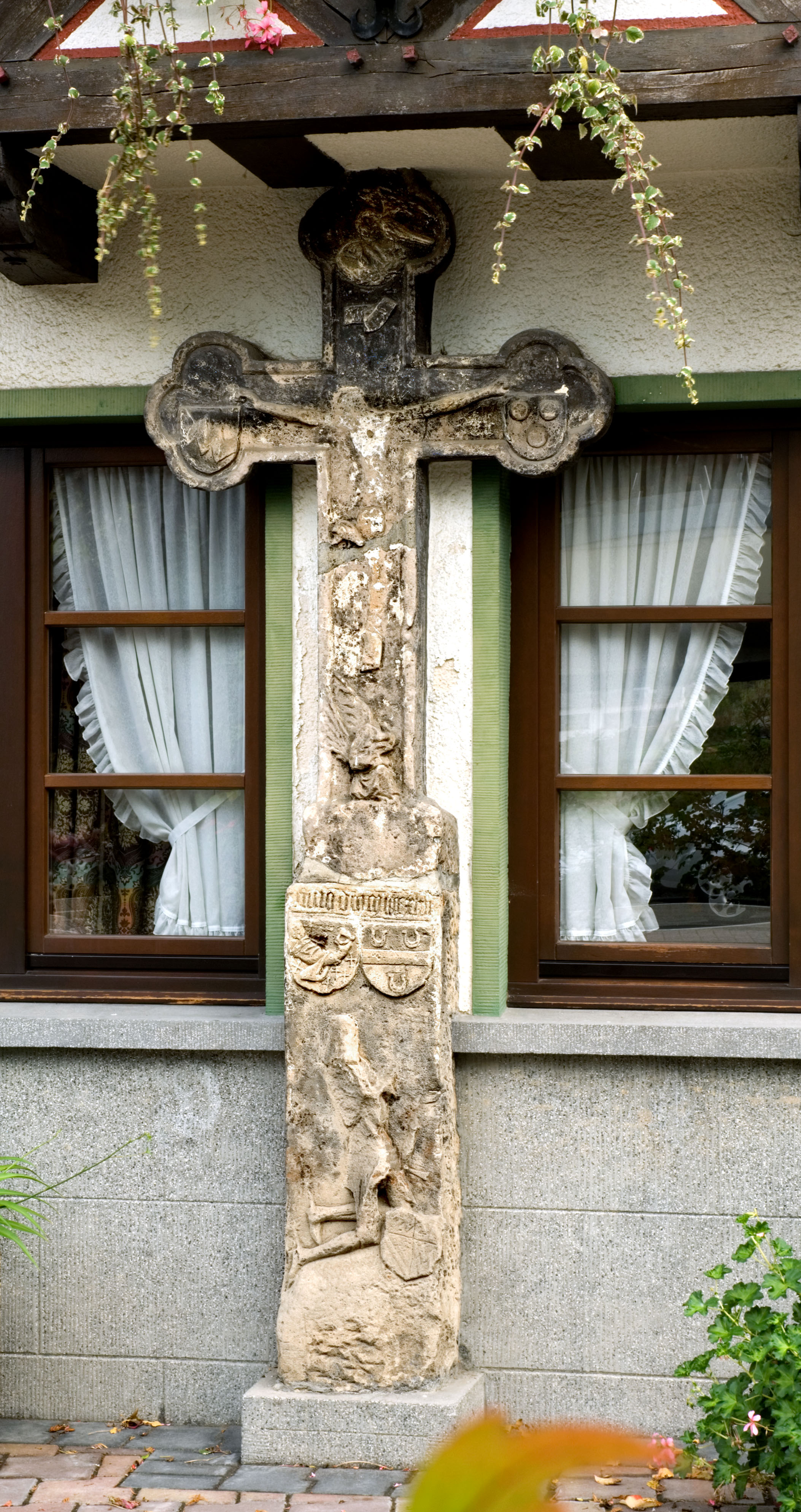 Spätgotisches Votivkreuz an der Fassade des ehemaligen Hotels "Schwarzer Ritter" in Brodenbach